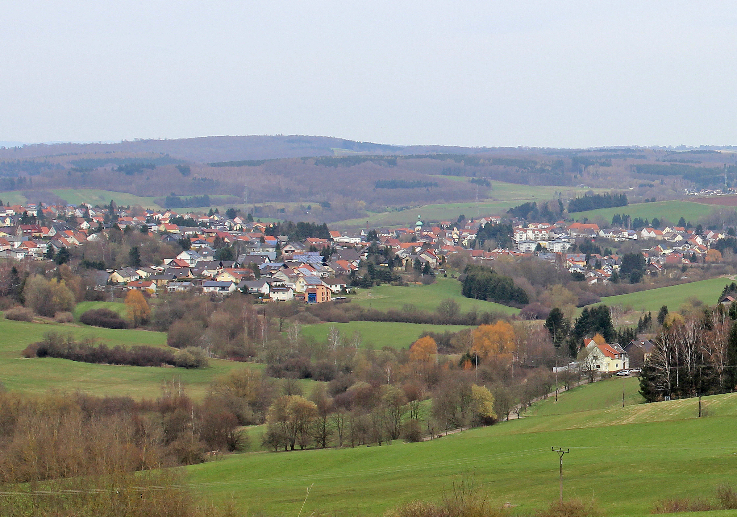 Ansicht von Illingen, Landkreis Neunkirchen, Saarland